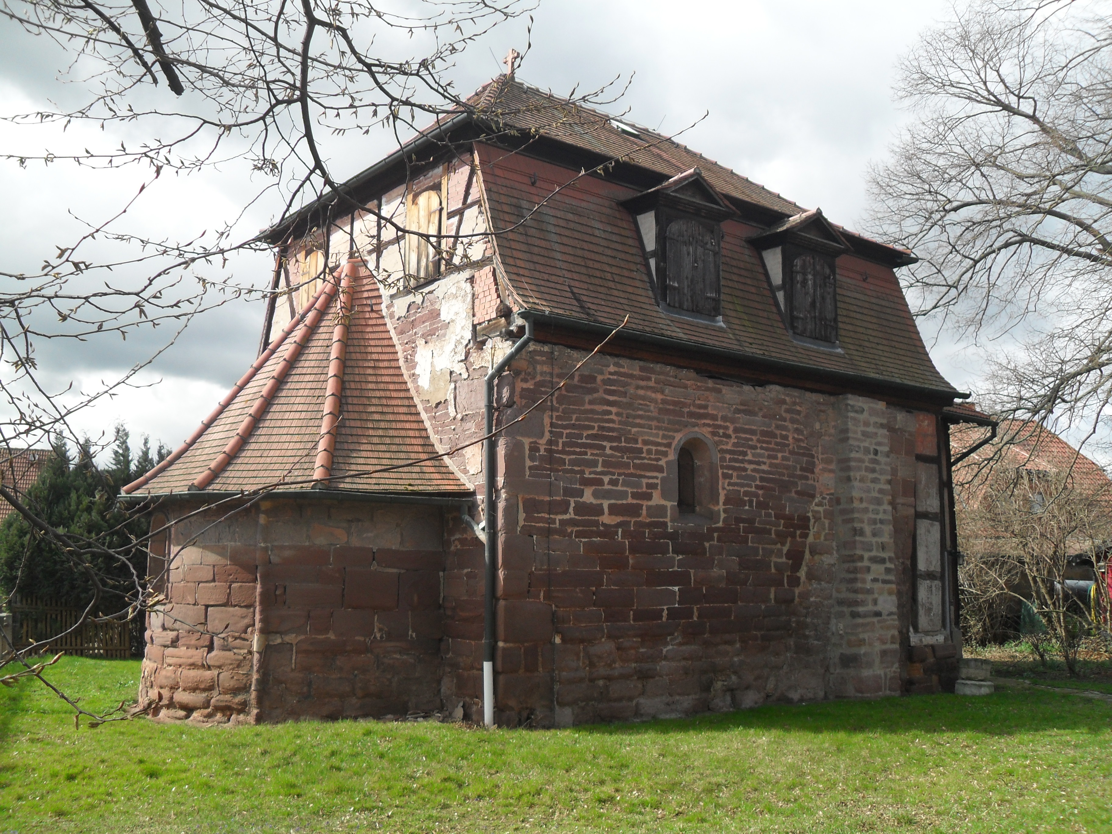 Die evangelische St.-Petri-Kirche, auch Altstädter Kirche genannt, wurde 1980 zusammen mit dem Dorf Altstadt in die Stadt Bad Frankenhausen eingemeindet. In dem Bau sind Reste einer größeren Vorgängerkirche aus dem 10. Jahrhundert eingebunden. Die Fensteröffnungen gehen auf das 13. Jahrhundert zurück.